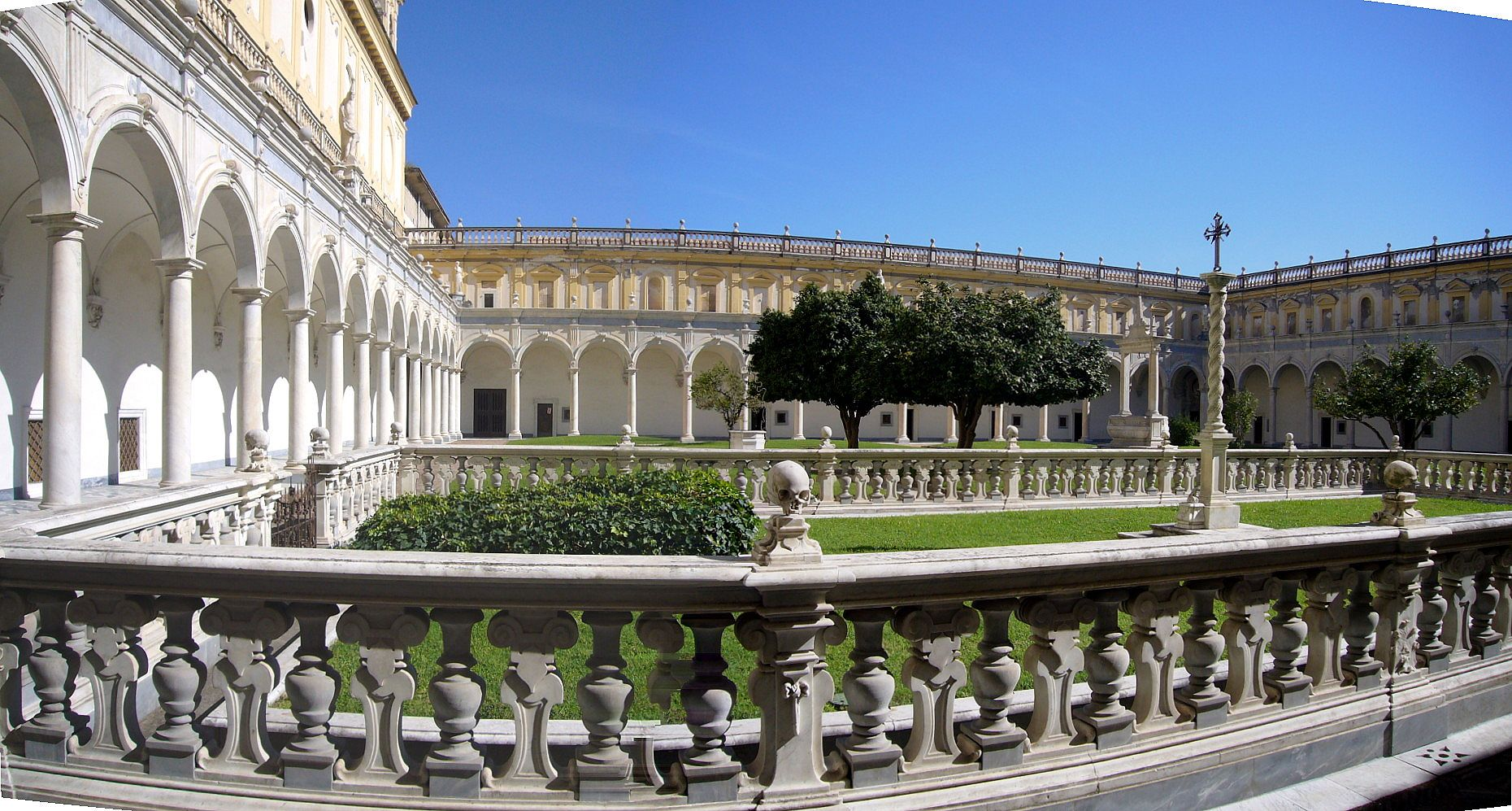 Napoli, Certosa di san Martino: cimitero dei monaci nel Chiostro grande